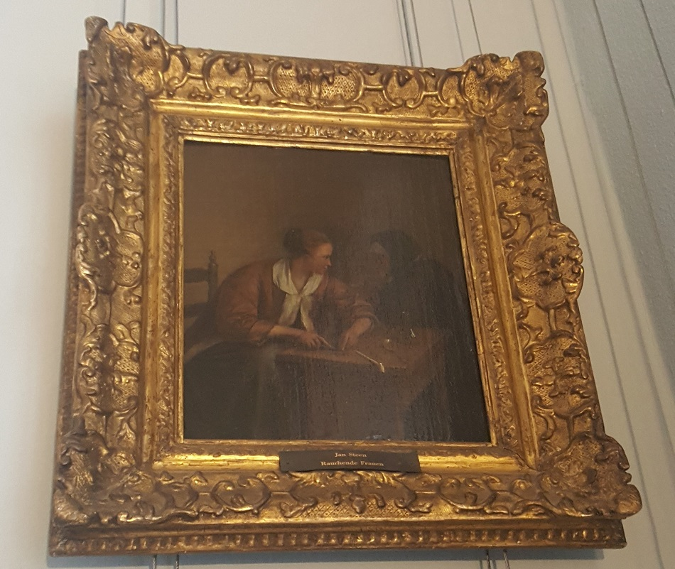 Jan Steen - Painting Rokende vrouwen in Schloss Oranieburg